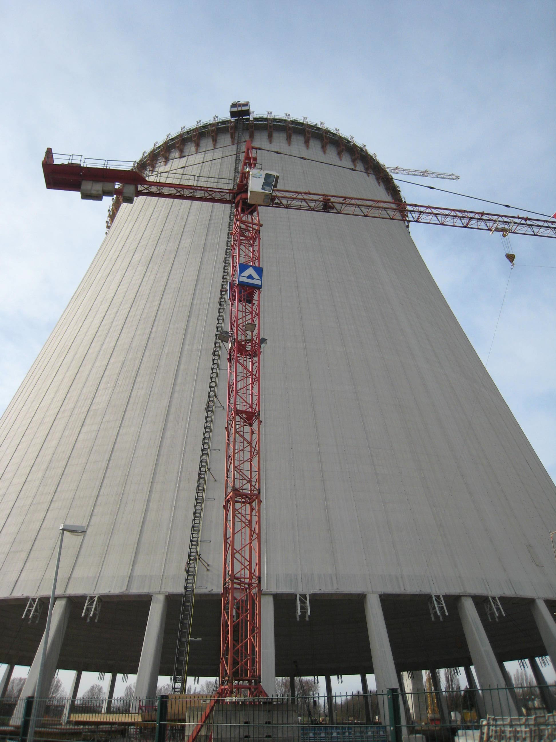 Kraftwerkneubau Duisburg Walsum